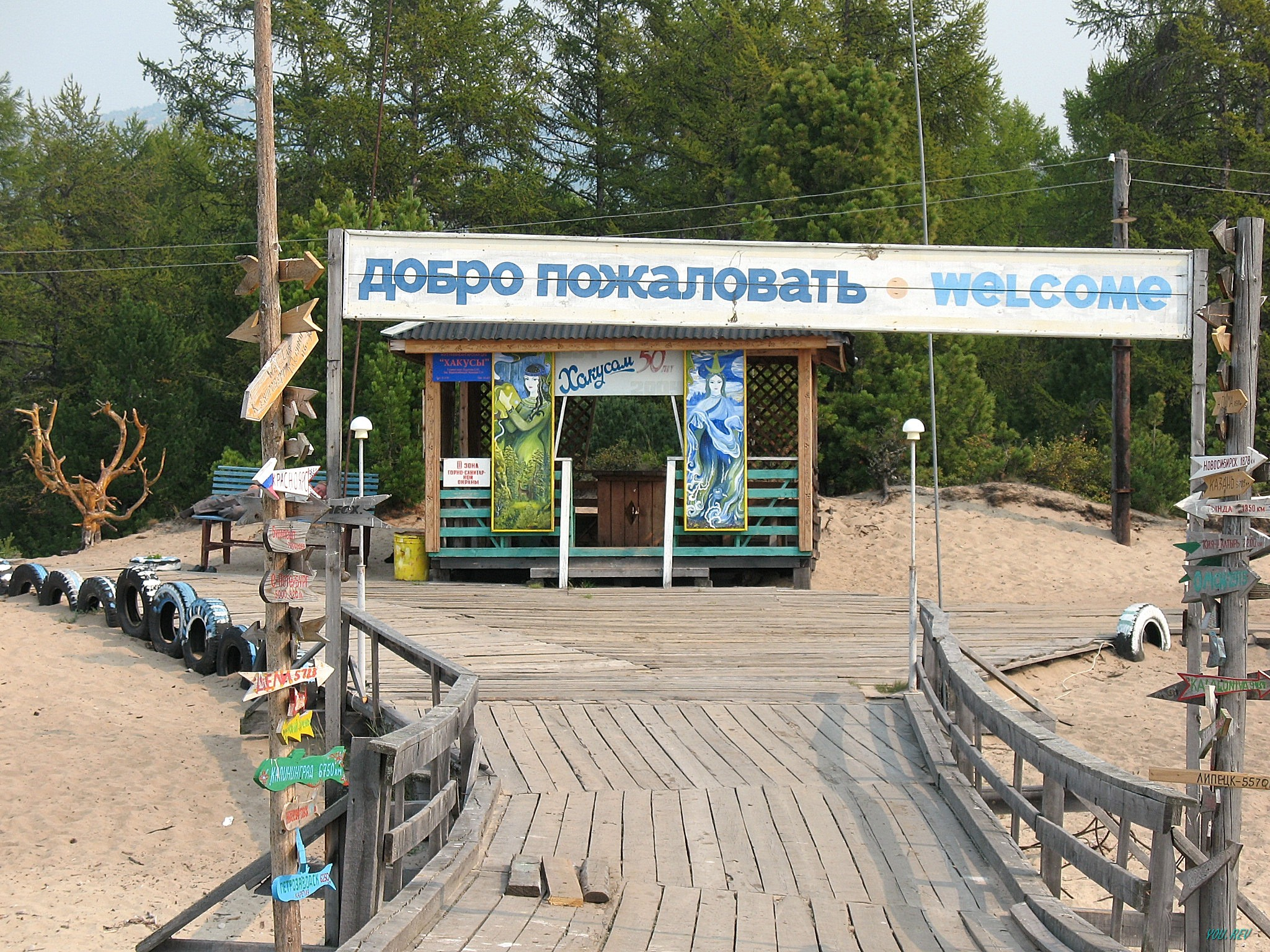 Причал на Хакусах